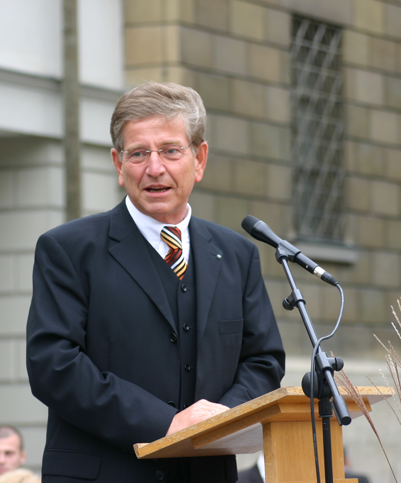 Thomas Goppel, CSU-Politiker, Mitglied des CSU-Parteivorstands. Hier während einer Rede anläßlich der Umbenennung einer Straße in München auf den Namen seines Vaters, des früheren bayerischen Ministerpräsidenten Alfons Goppel.